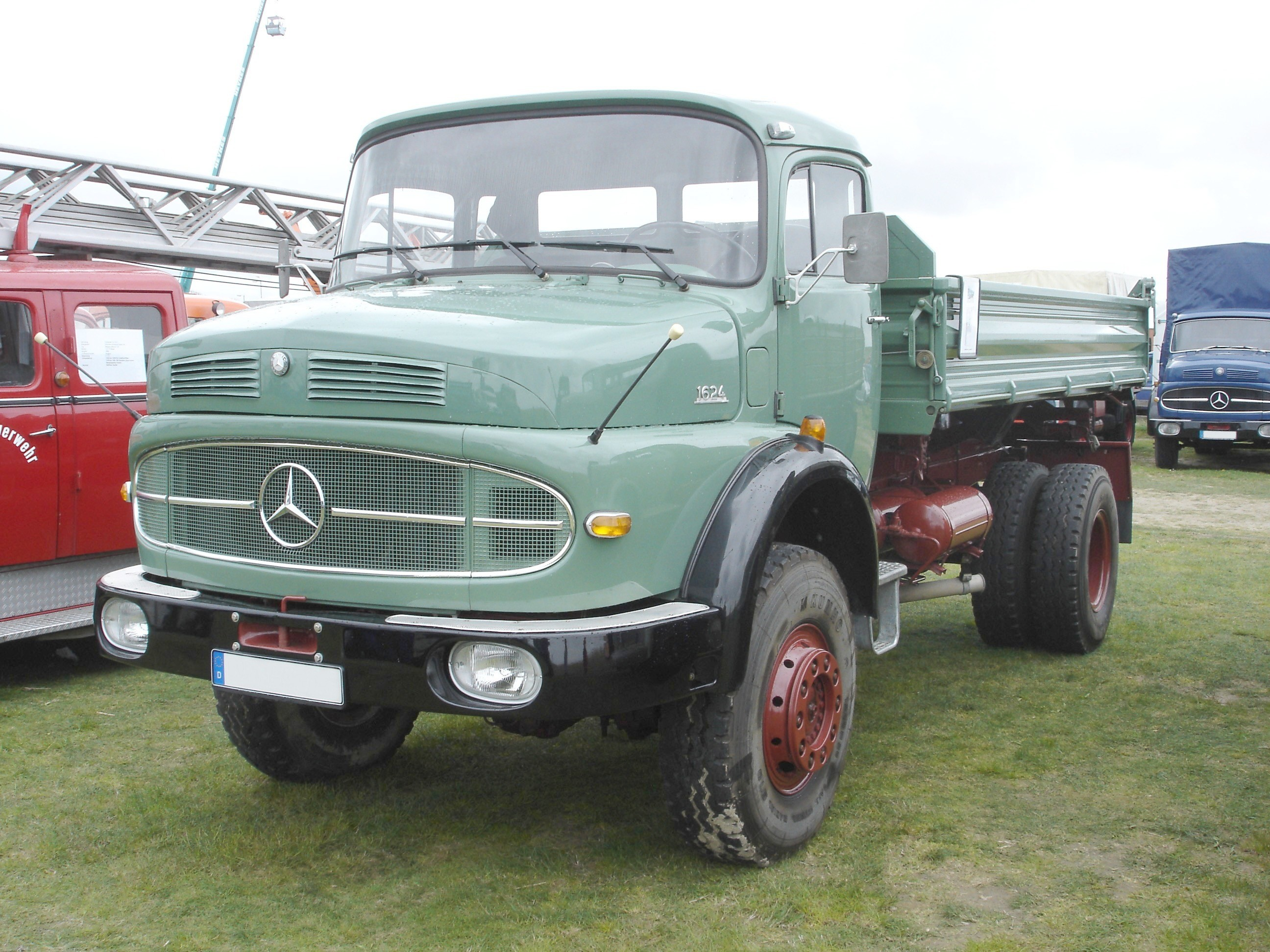 Lkw Mercedes-Benz LAK1624 Kipper